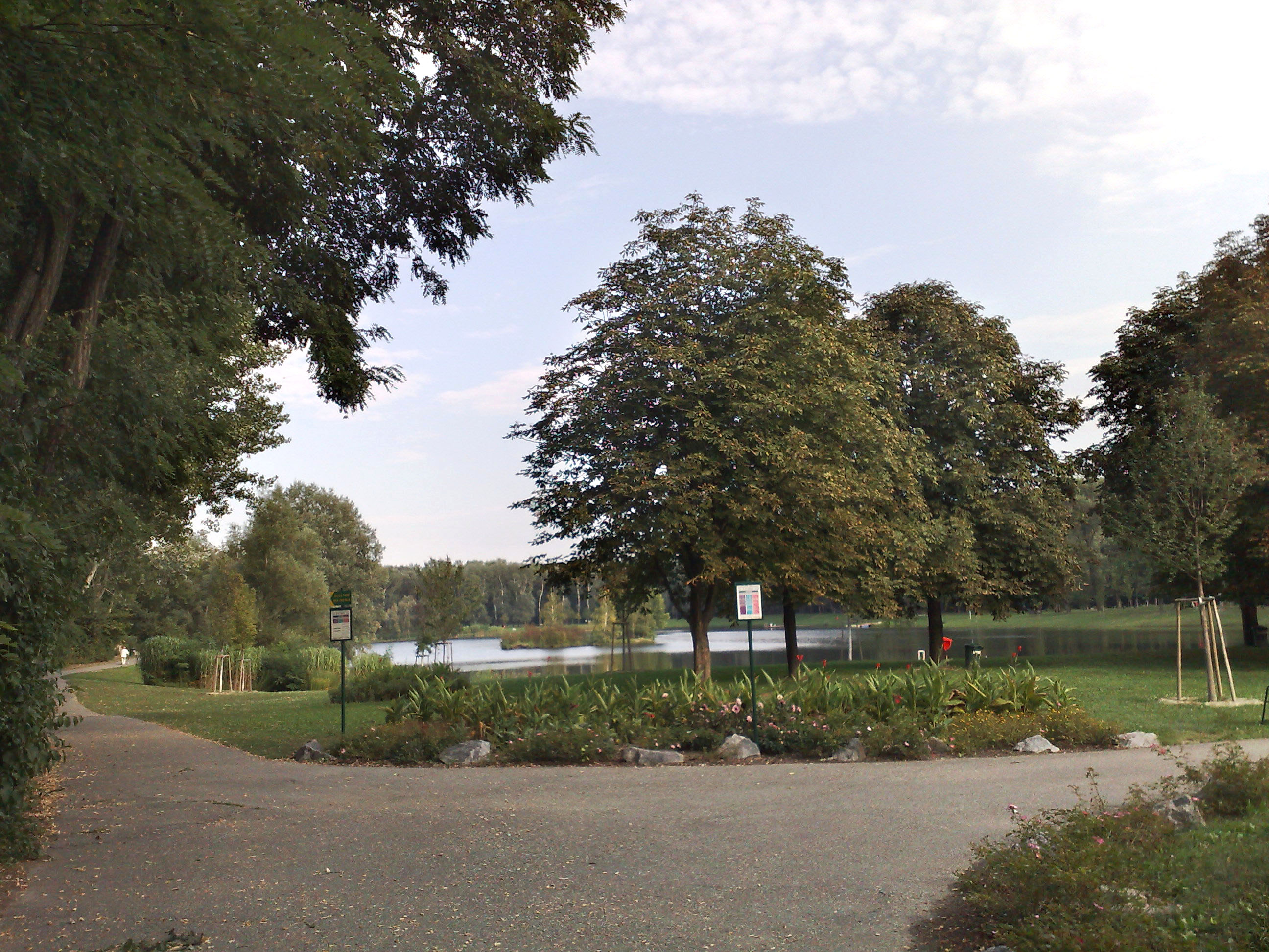 Das Aubad in Tull; Blick von Westen Richtung Osten